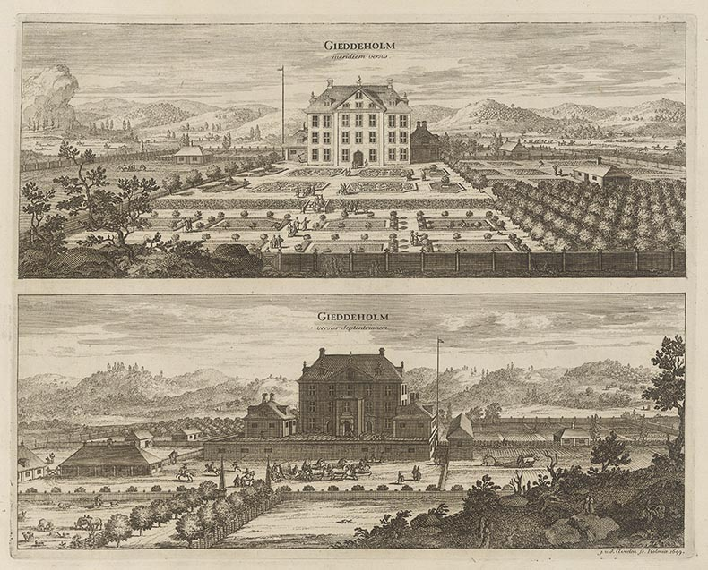 Gäddeholm före 1719, innan Tureholms slott byggdes